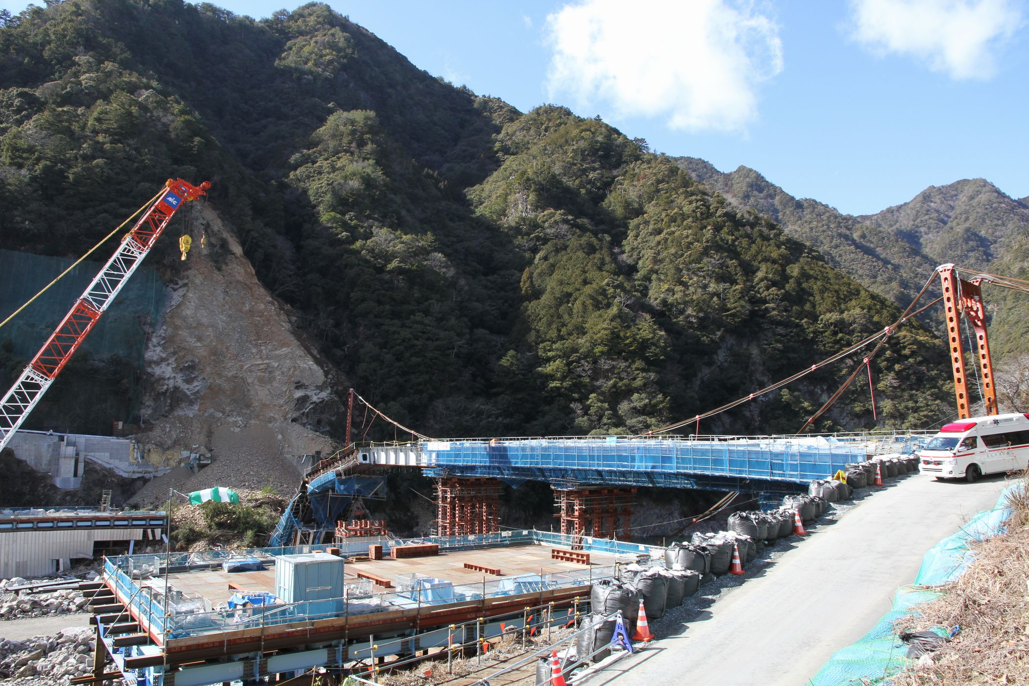 土砂崩れによる原田橋落橋現場。事故から13日後に撮影。